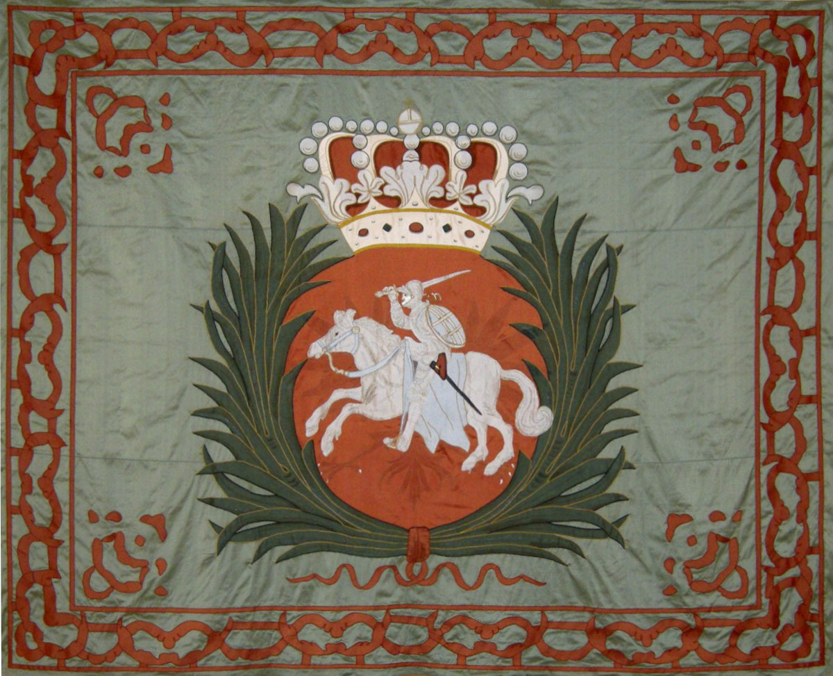 Беларуская (тарашкевіца): Харугва караля і вялікага князя Аўгуста Моцнага з гербам «Пагоня» («Pahonia»)